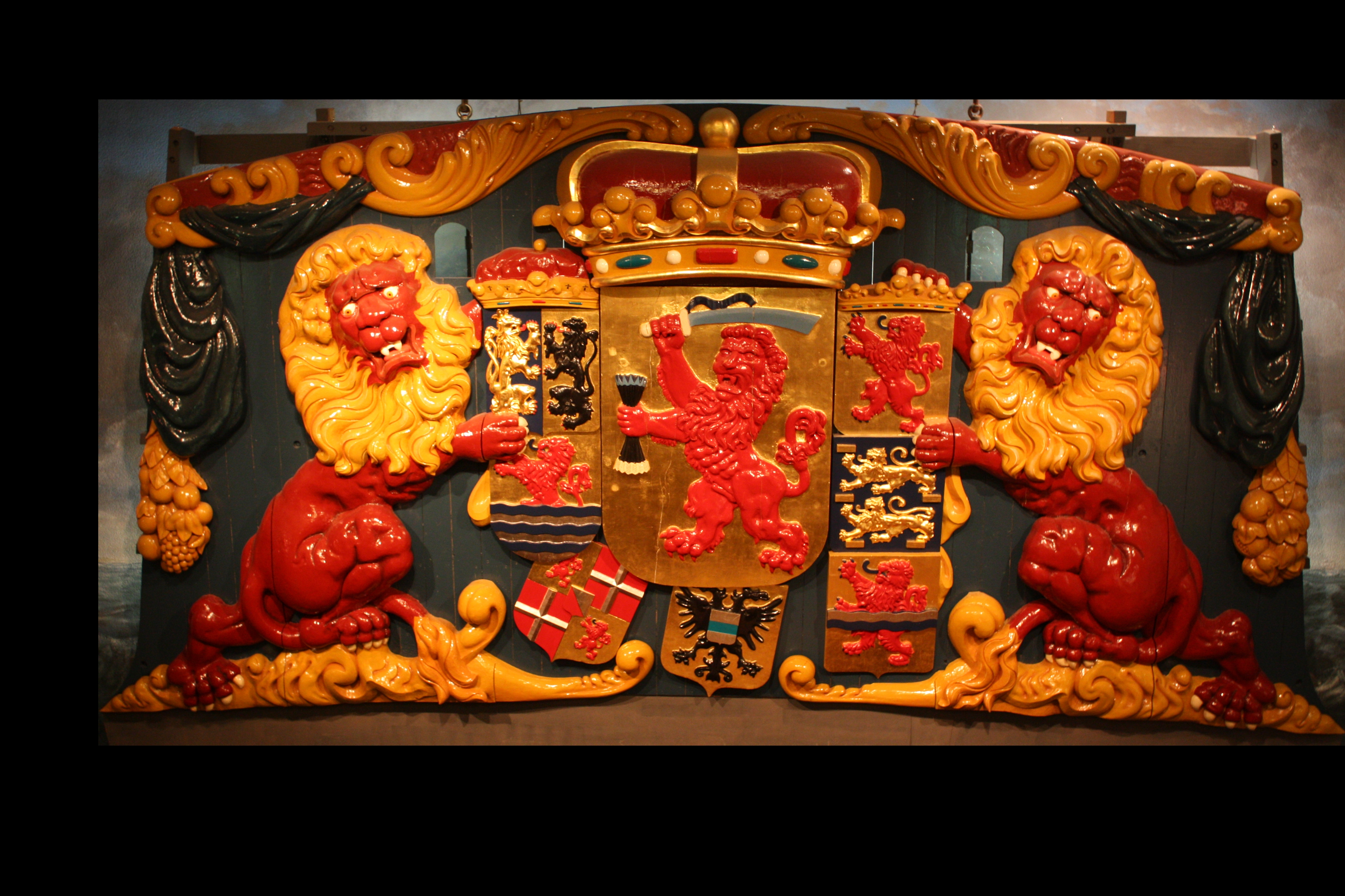 Replik des Heckspiegels der De Zeven Provincien